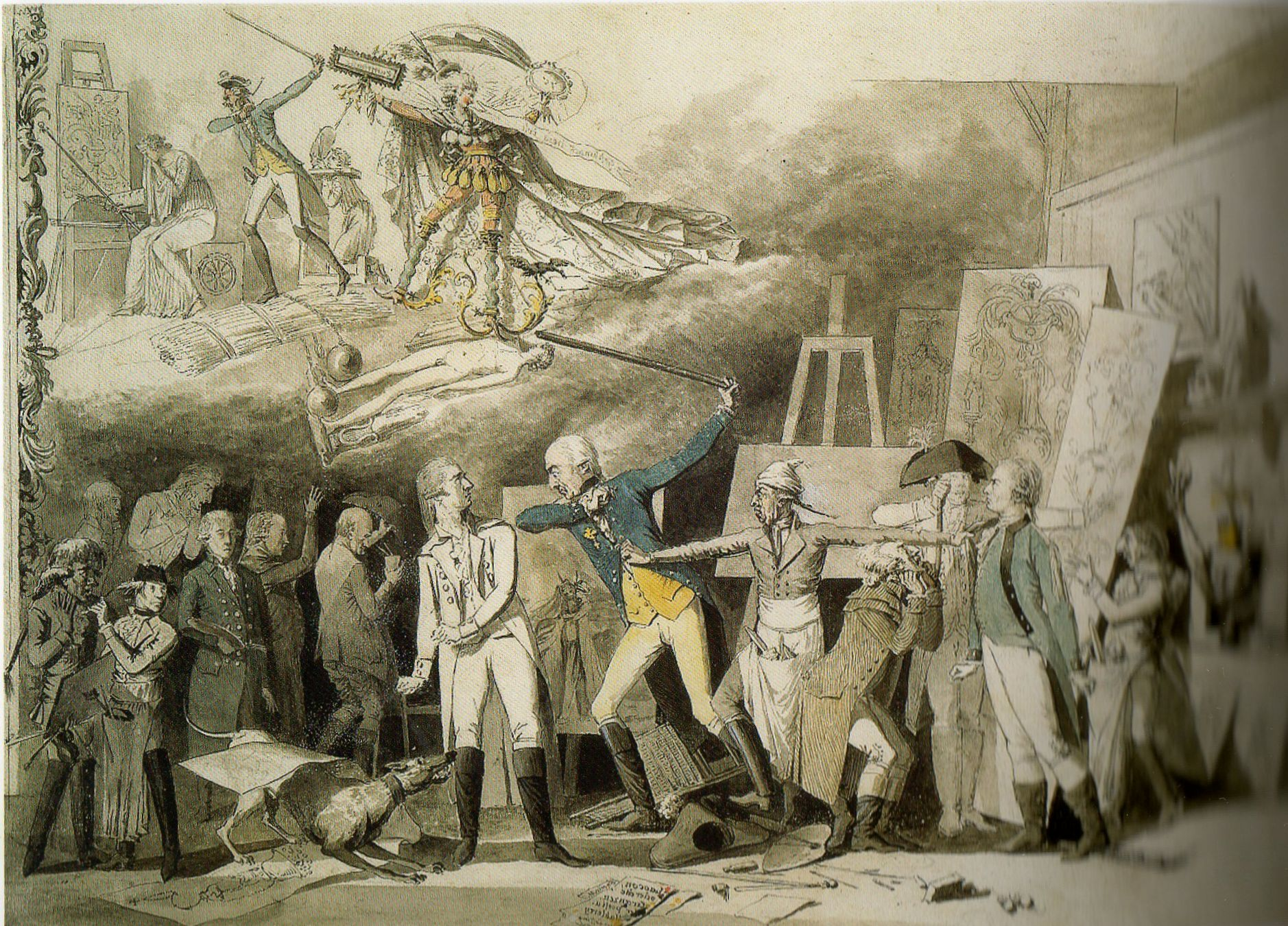 Karikatur auf die Kunstpraxis an der Hohen Karlsschule, Ausschnitt